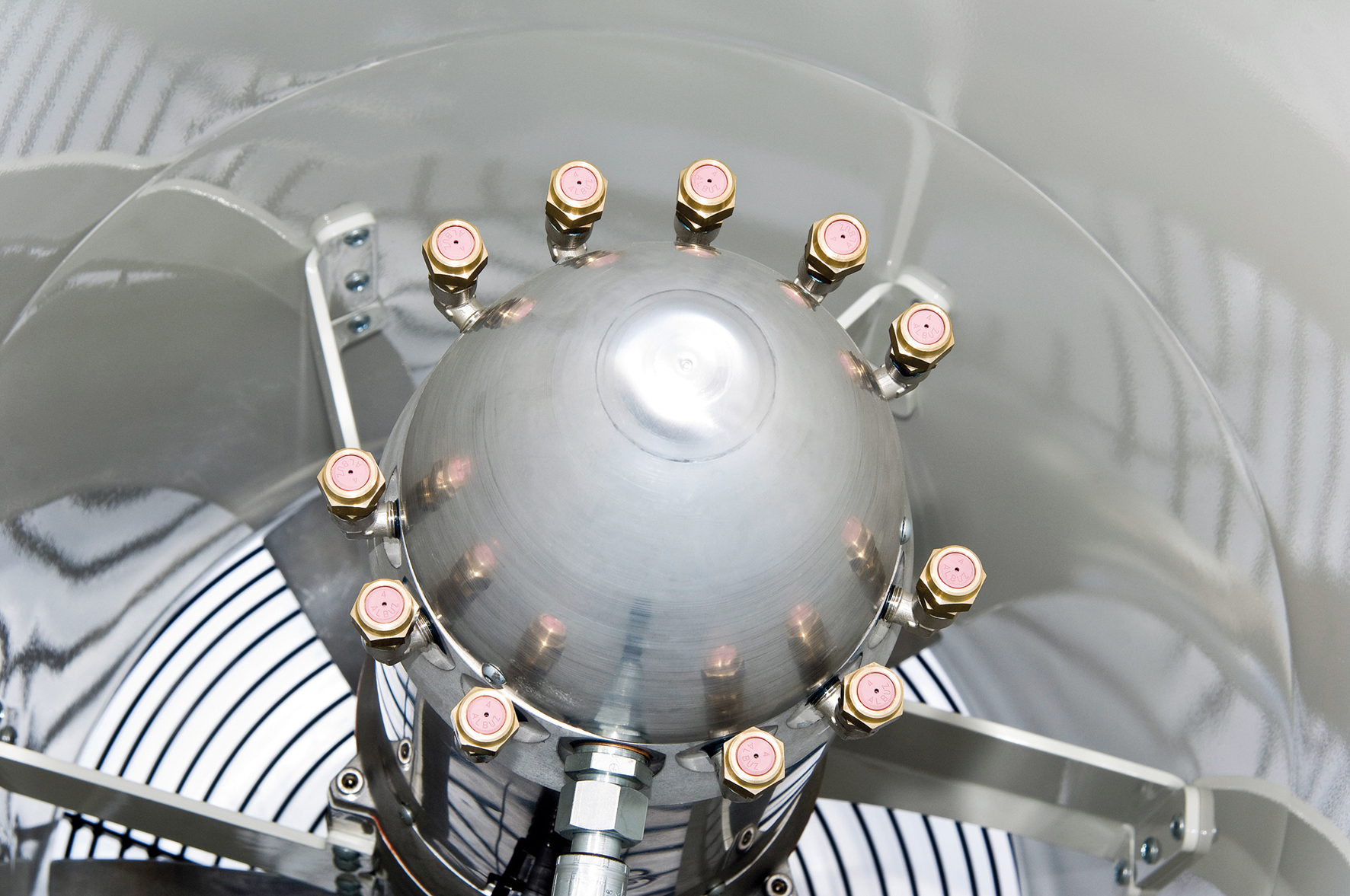 DIe Düsen einer Dct40-Staubbindemaschine von EMI Controls